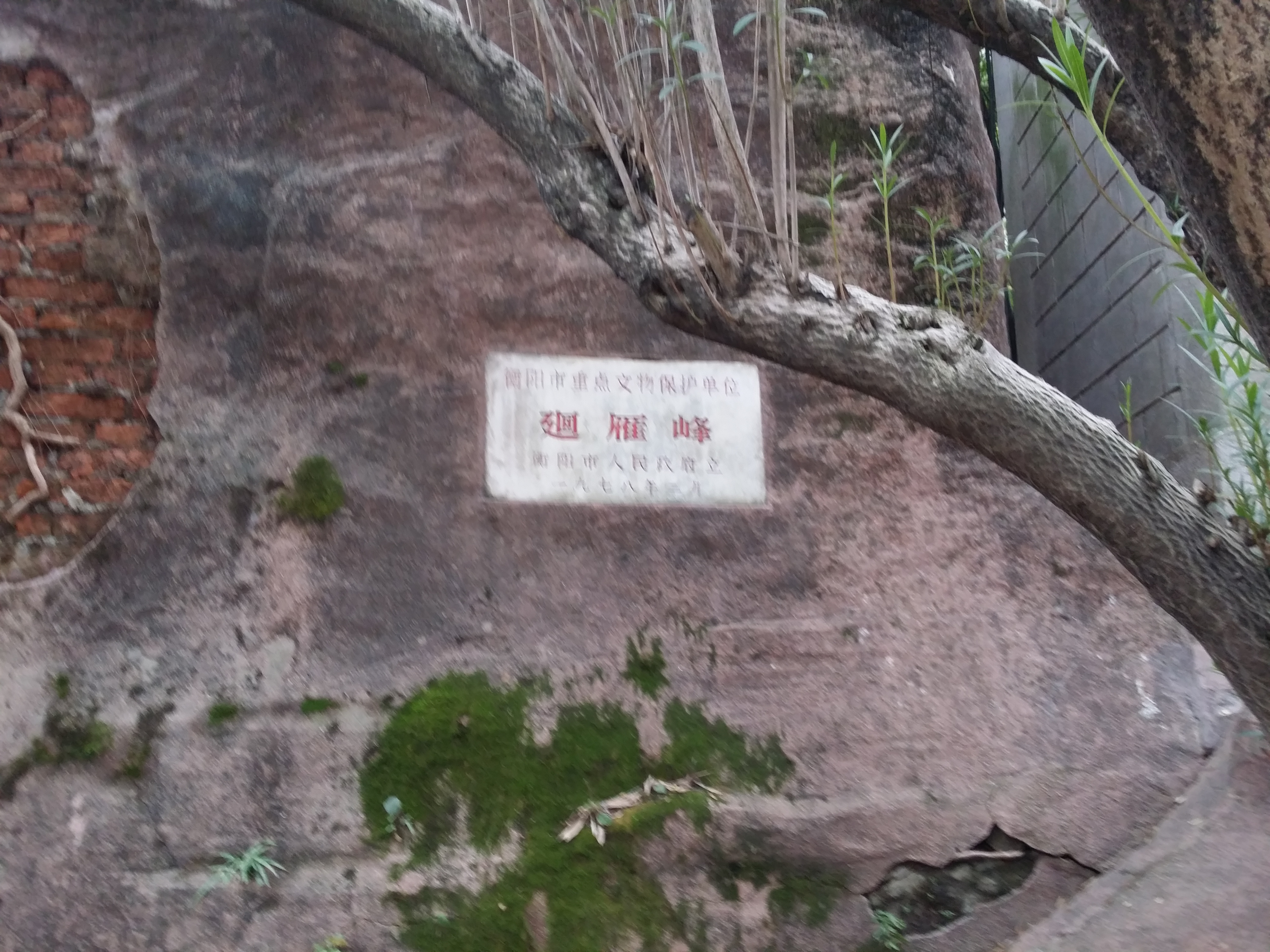 中文（中国大陆）: 回雁峰的文物保护单位标示